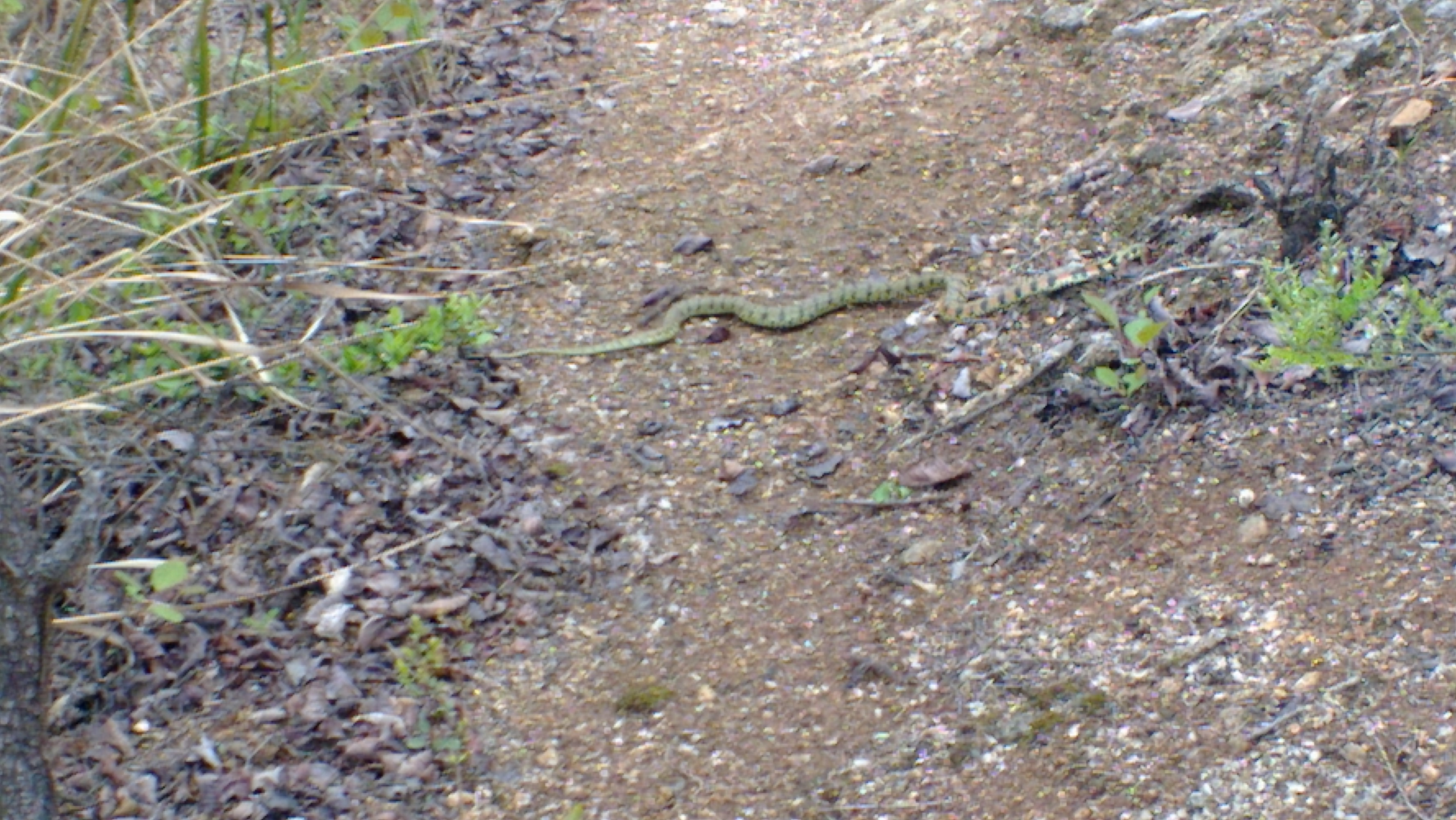 中文（台灣）: 世事滄桑，七十餘年過去，當年灼熱的熊火，撕心裂肺的呼救聲，而今此地已經是生機盎然的生態環境，唯有這富有生命力的蛇，似乎在為逝者超度，為生者祈求人類和自然永久之和平。